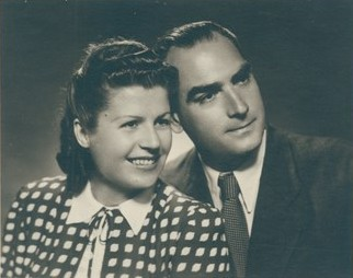 Актрисата Елена Стефанова със съпруга си Йордан Стефанов.